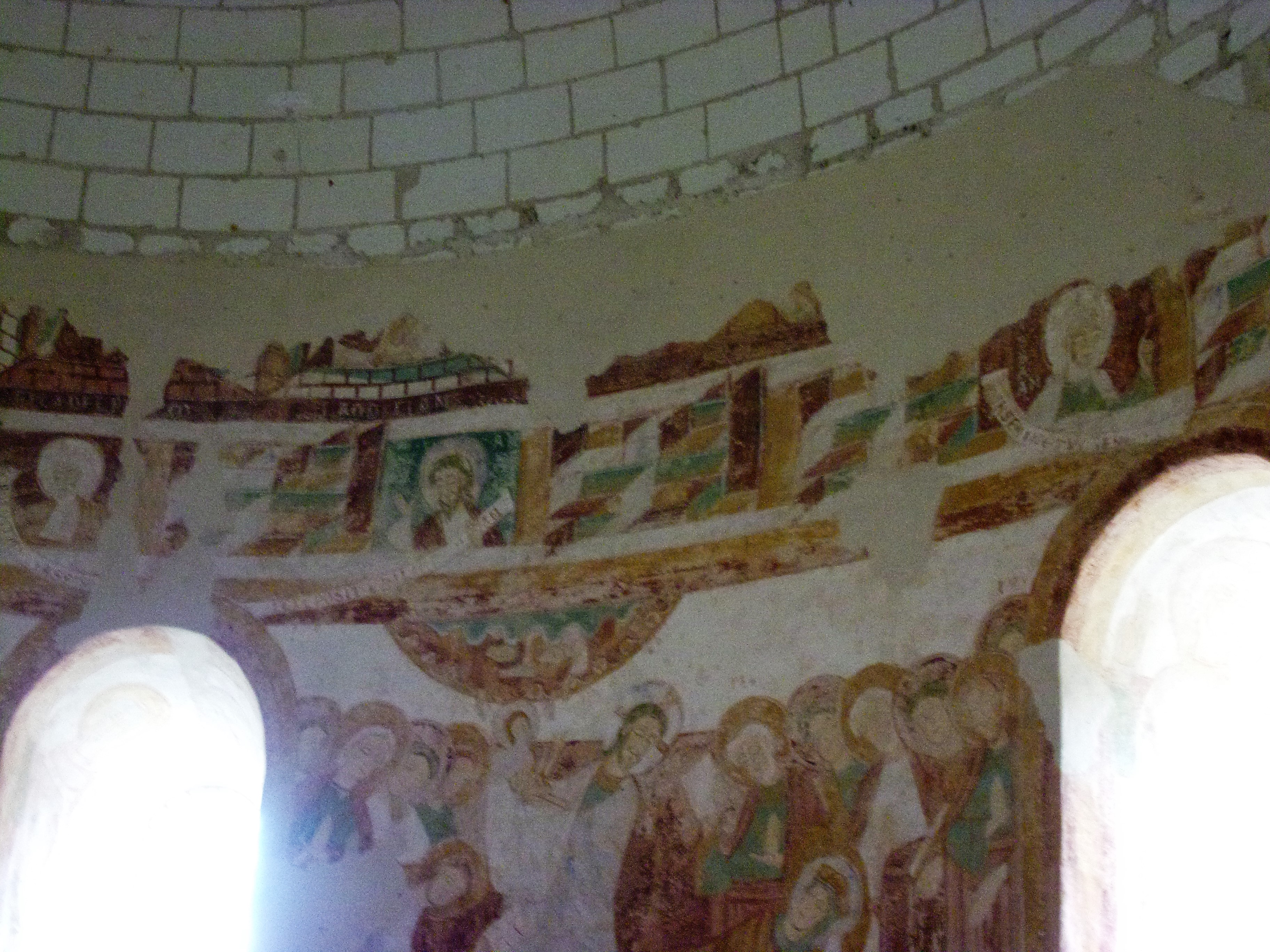 Frise supérieure (vue partielle)